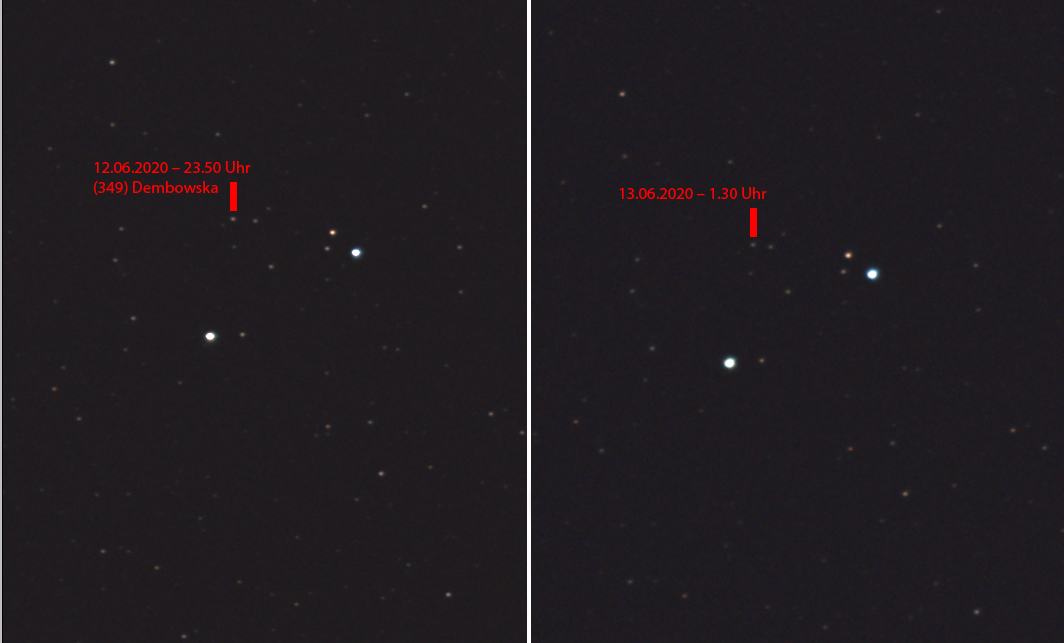 Zwei Fotografien des Kleinplaneten (349) Dembowska im Abstand von 100 Minuten. Die Ortsänderung ist bereits erkennbar. Die Fotos sind aus je 110 Einzelaufnahmen zu je 1 s Belichtungszeit gestackt: Kamera: Canon EOS 6D Mark II; Objektiv: Canon 200 mm Tele f/2.8, Blende 1/2.8 Sternbild Libra (Waage) Die beiden hellen Sterne sind: links - HIP 72310, 5.89 mag; rechts (weiter oben) HIP 72217, 6.37 mag Der Kleinplanet hat auf dem Foto 10,6 mag. Die schwächsten abgebildeten Sterne haben knapp über 12 mag Ort: Landsberied (zwischen Mammendorf und Schöngeising), Oberbayern, Bayern, Deutschland